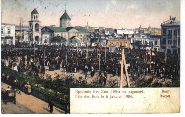 Մկրտություն Բաքվի Պարապետ հրապարակում 1904 թվականի հունվարի 6-ին: Հետևի պլանում հայկական Սուրբ Գրիգոր Լուսավորիչ եկեղեցին է